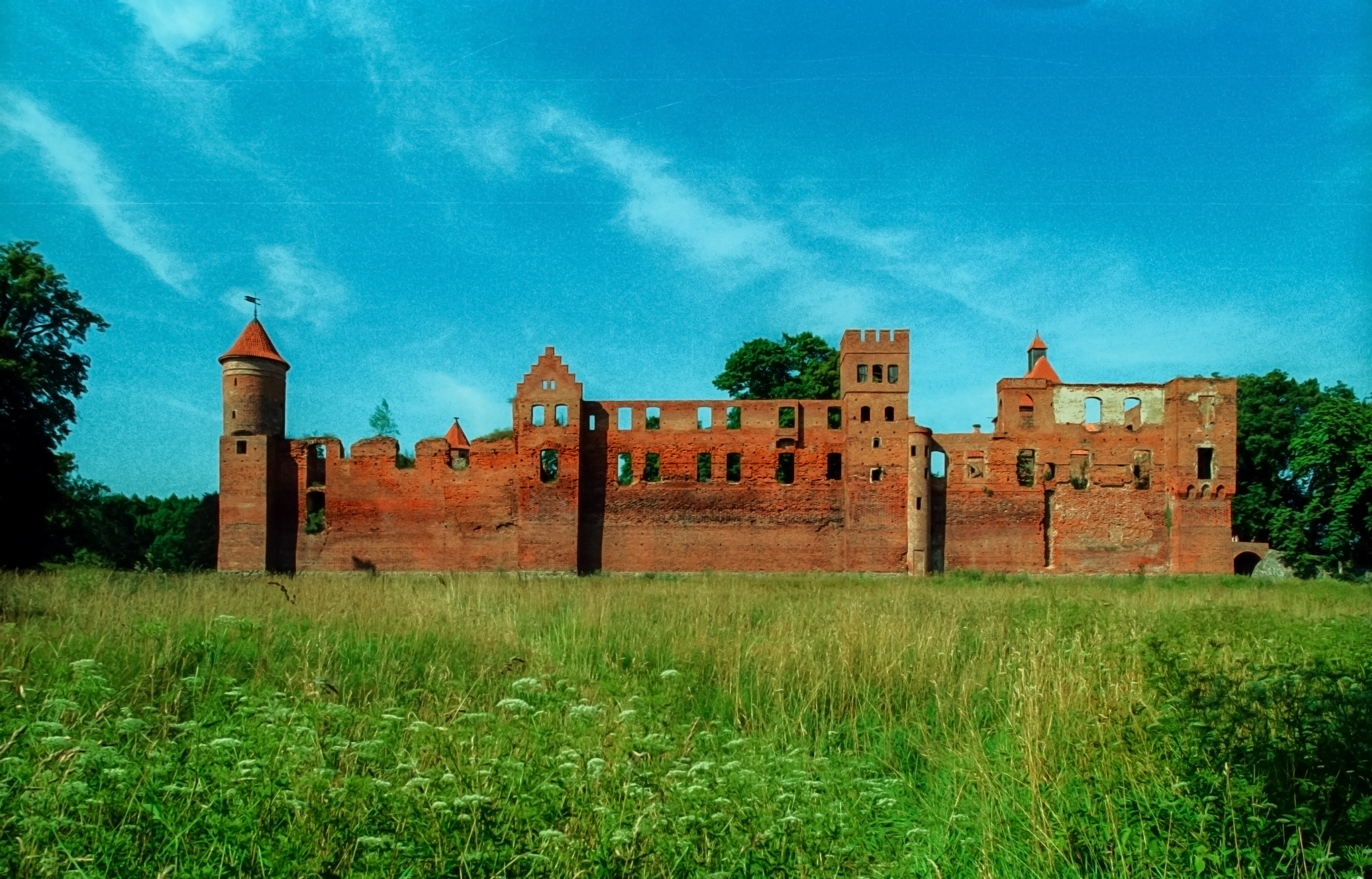 Szymbark Castle